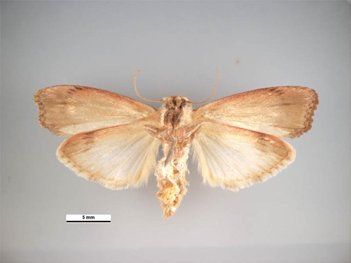 Galleria mellonella ventral view